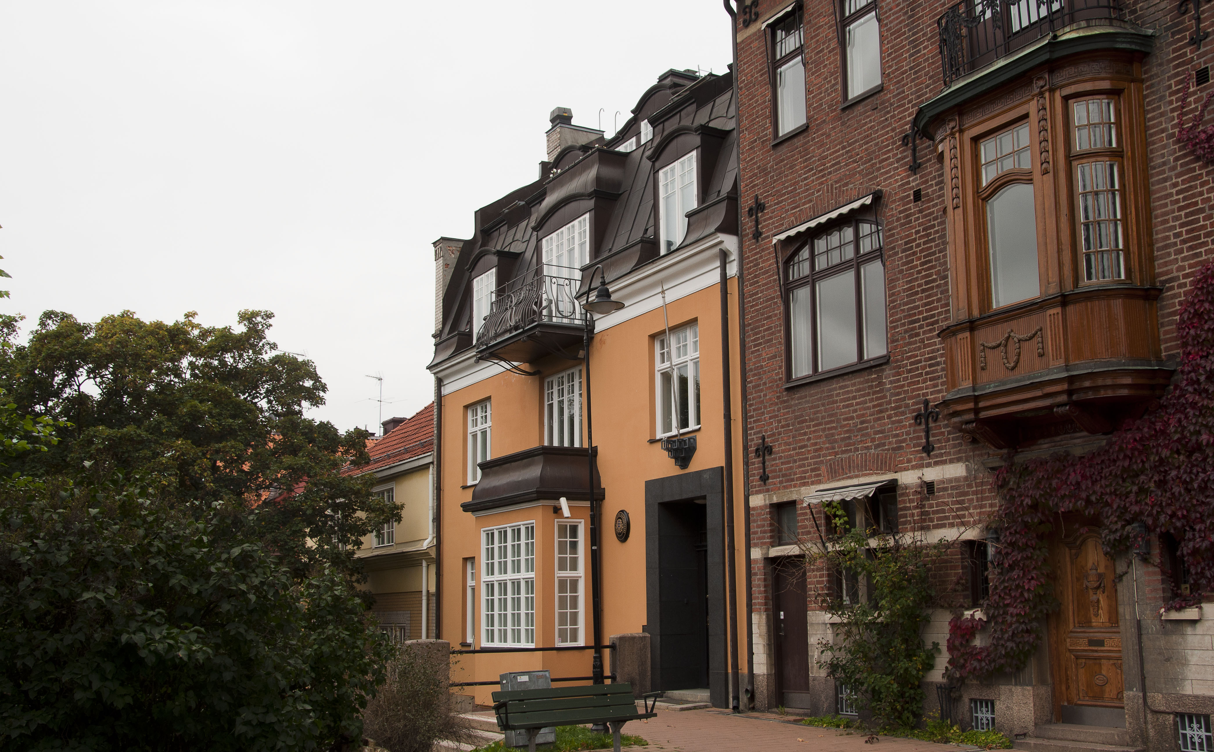 Tyrgatan 3 (Tofslärkan 14): Byggnadsår 1910-12, arkitekt N Lovén, byggherre och byggmästare Alb Andersson. Här finns Estlands ambassad i Stockholm. Till höger om föregående byggnad; Tyrgatan 5 (Tofslärkan 13): Byggnadsår 1909-10, arkitekt E Josephson, byggherre G Jacobsson, byggmästare A Nordström.